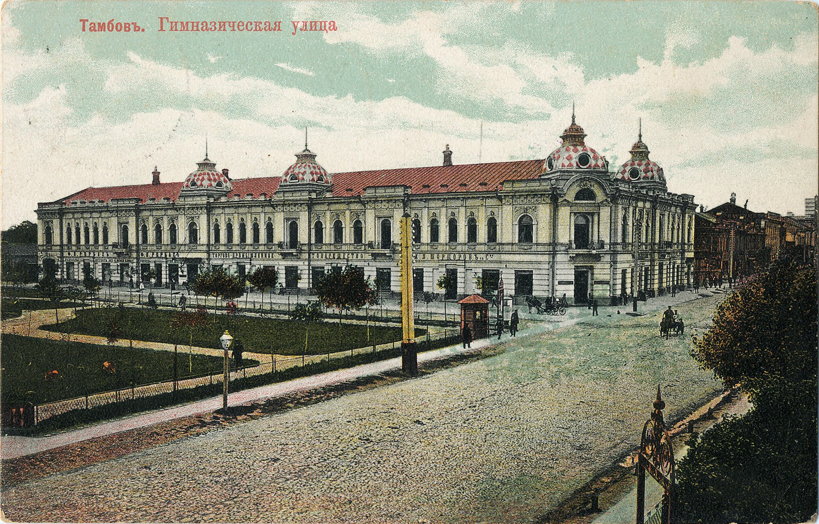 Гостиница Европейская (дом Шоршова) в Тамбове. Конец XIX века